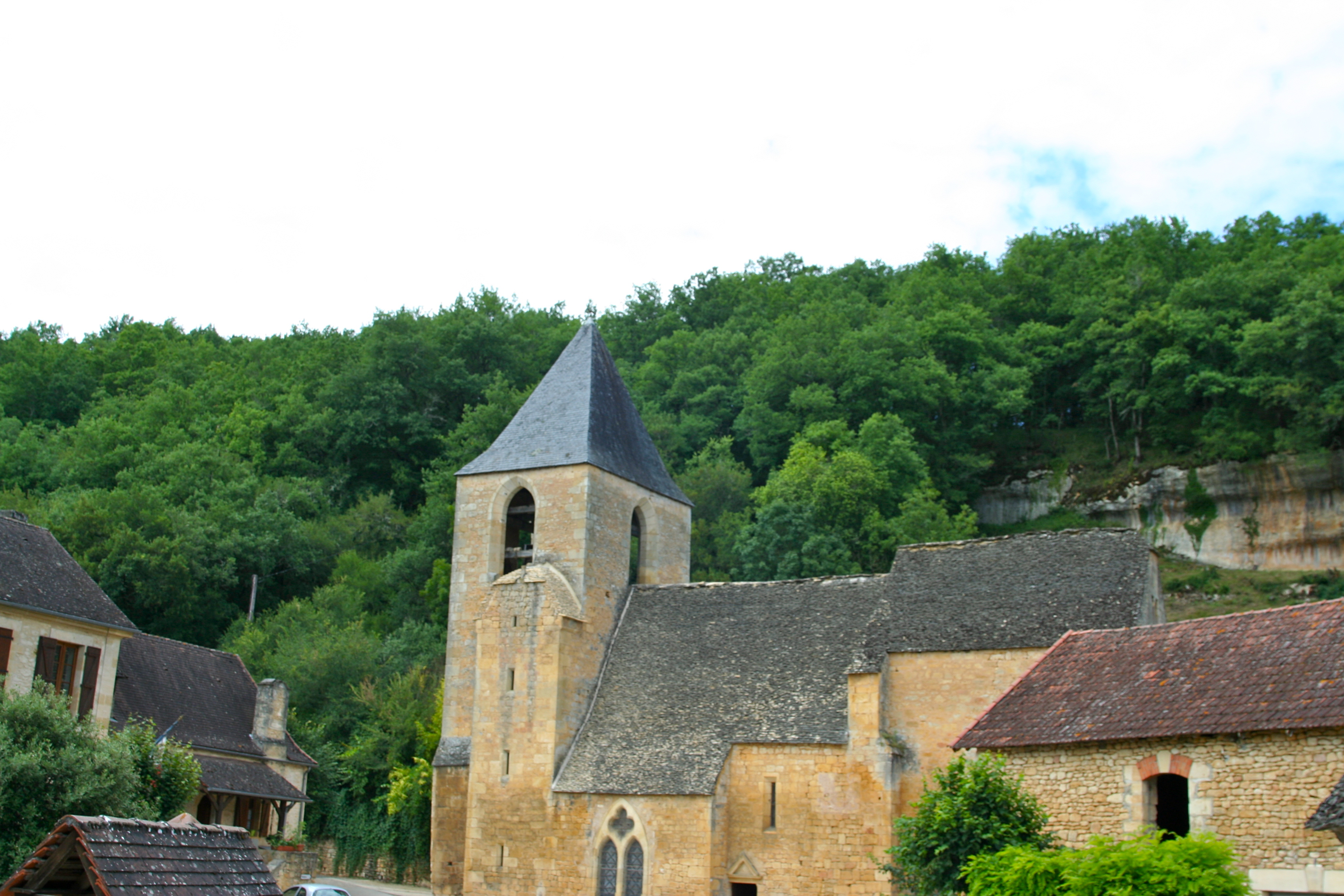 Valojoulx, village de Dordogne en vallée Vézère